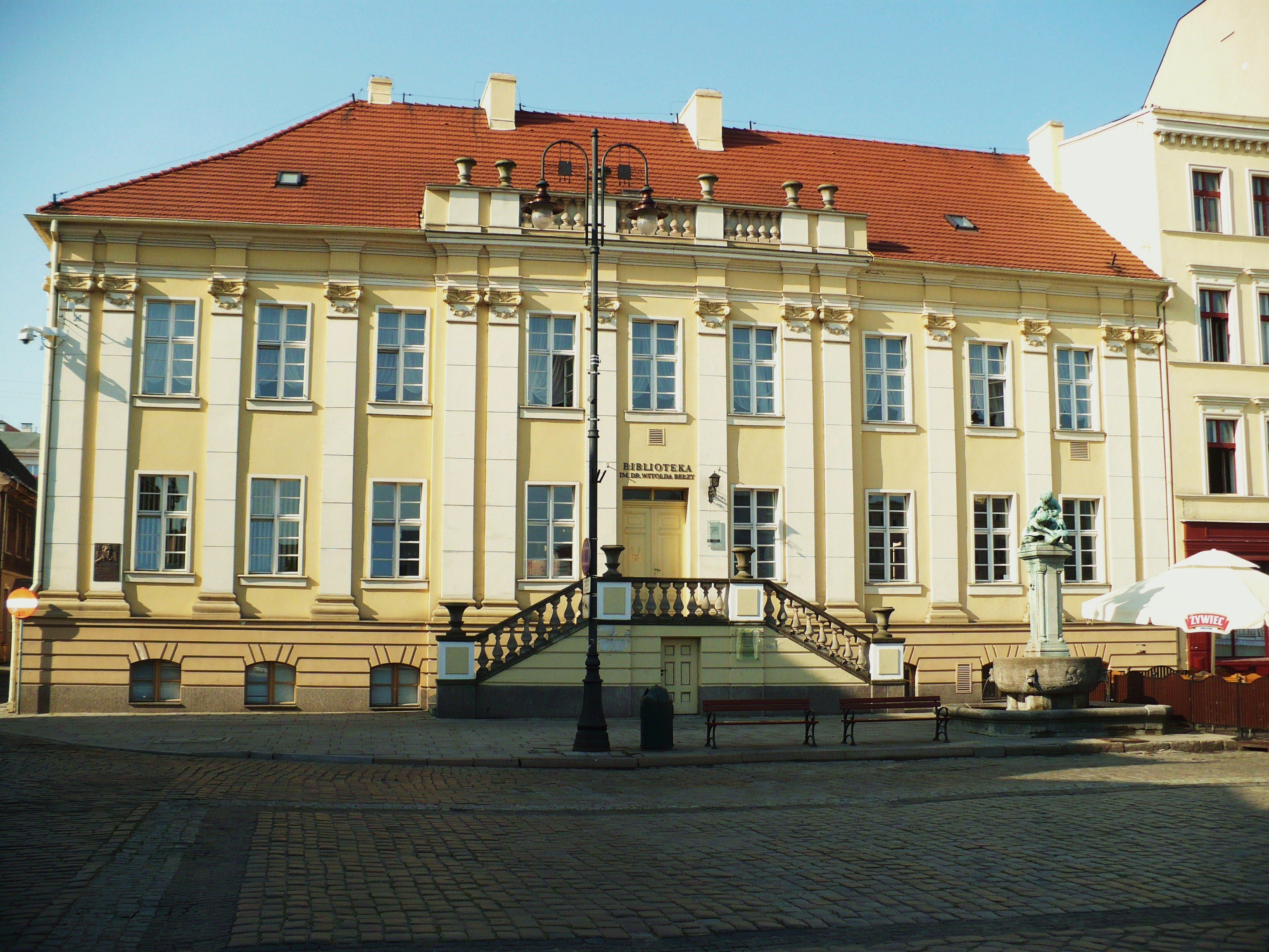 Biblioteka Miejska, 1774-1778 Bydgoszcz, ul. Stary Rynek 24 / ul. Długa 41, miasto Bydgoszcz